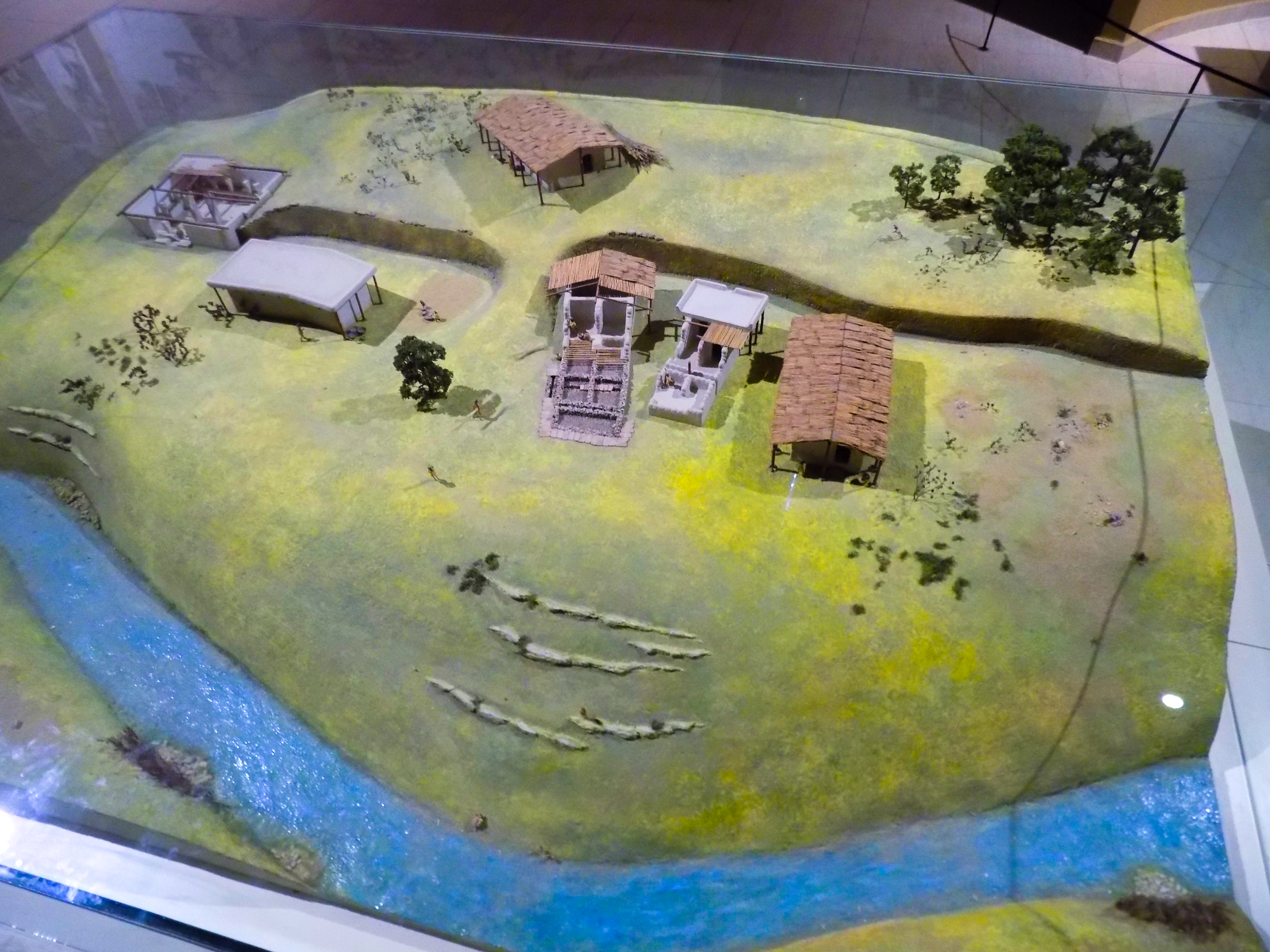 Şanlıurfa Müzesinin Neolitik Çağ salonununda sergilenen Nevali Çori kazı alanı maketi.